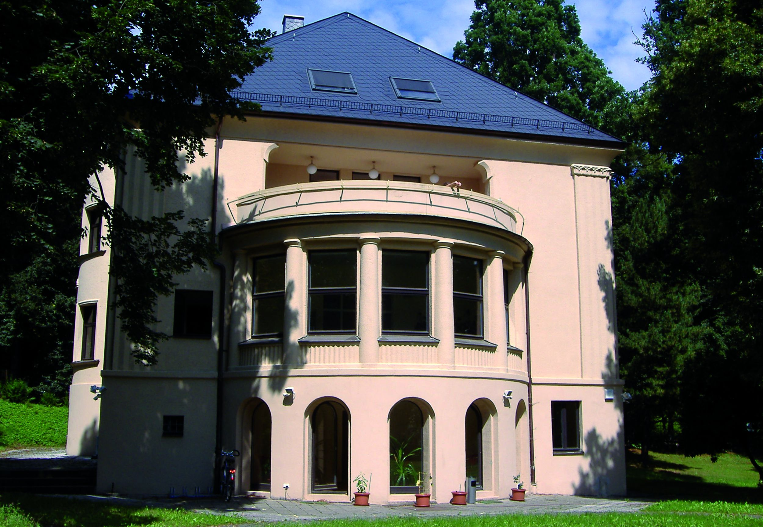 Deitsch: Die unter Denkmalschutz stehende Villa Hahn wurde 1923 von dem Architekten Eugen Weber in Chemnitz erbaut. Die Villa Hahn ist ein Bestandteil des gesamten historischen Villenensembles des Chemnitzer Stadtteiles Kapellenberg, dem ehemaligen „Stollberger Viertel“, wie dieses Gebiet einst genannt wurde. Hier siedelten sich um 1900 viele wohlhabende Chemnitzer Bürger an.